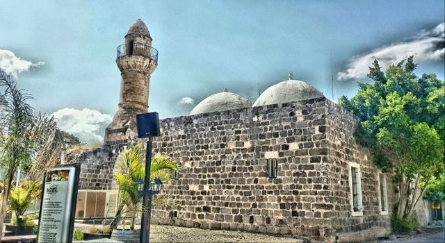 مسجد البحر في طبرية، الاحتلال الاسرائيلي